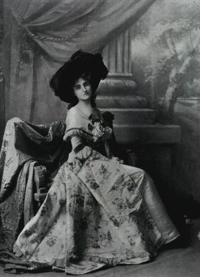 Минни Терри в 1902 году (The Tatler, 1902, №10 за сентябрь)